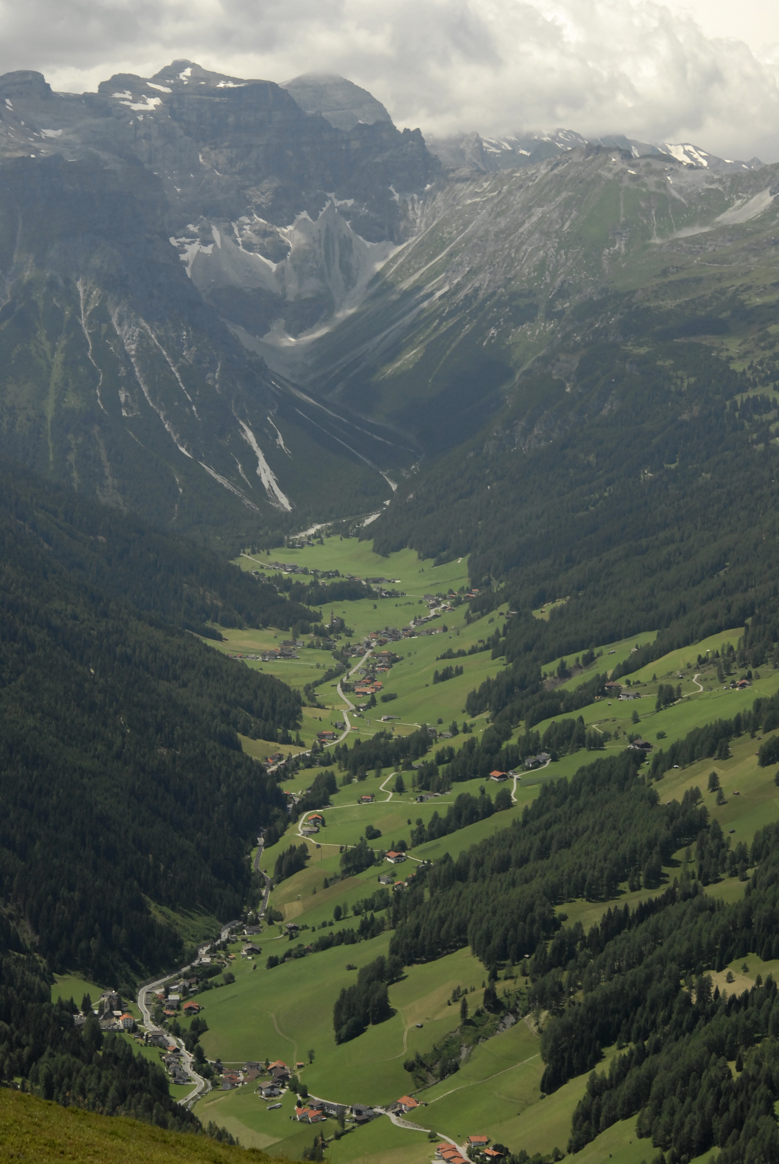 Obernberg from the east, Padauner Kogel